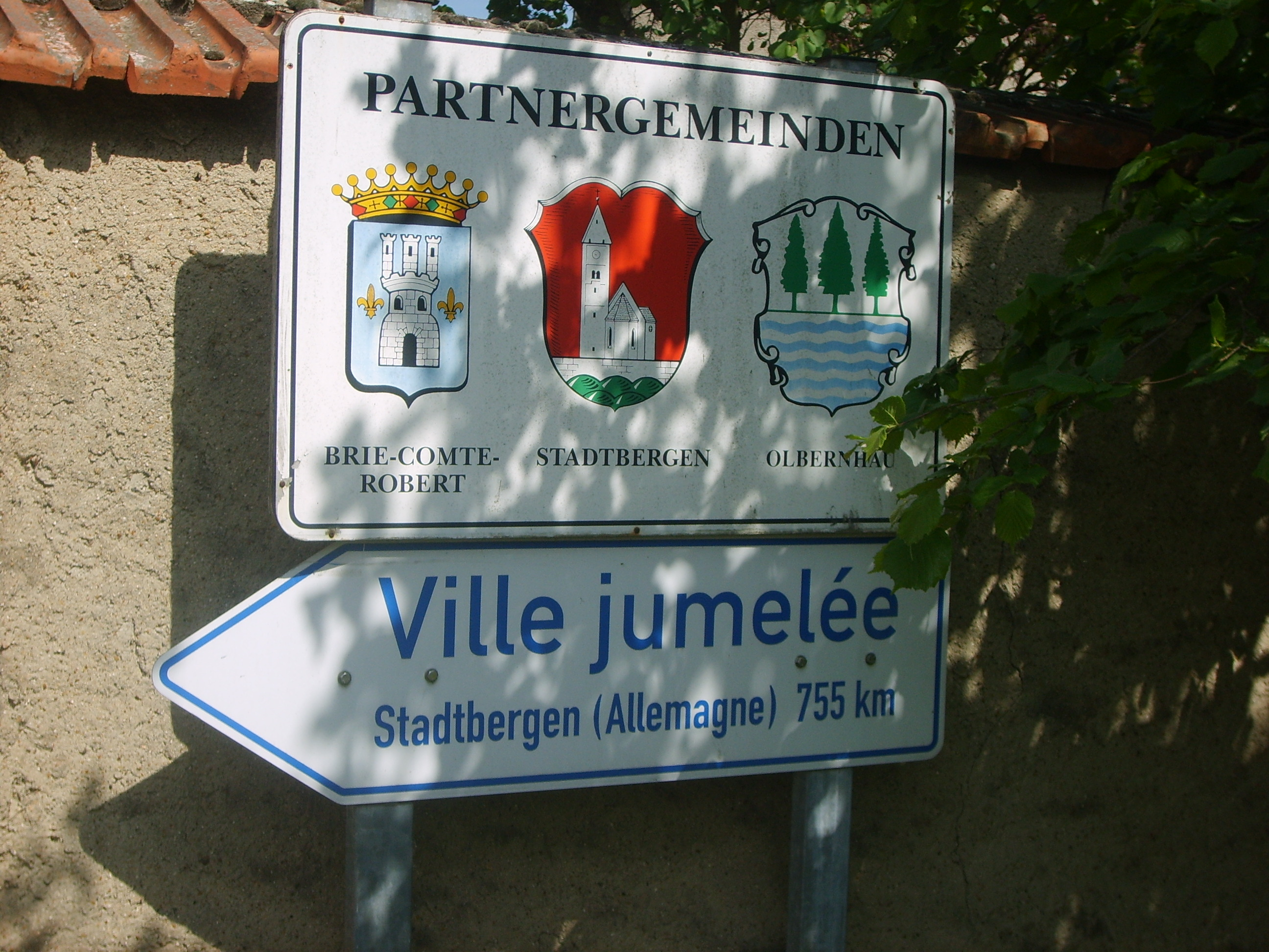 Paneau des villes jumelée de Brie